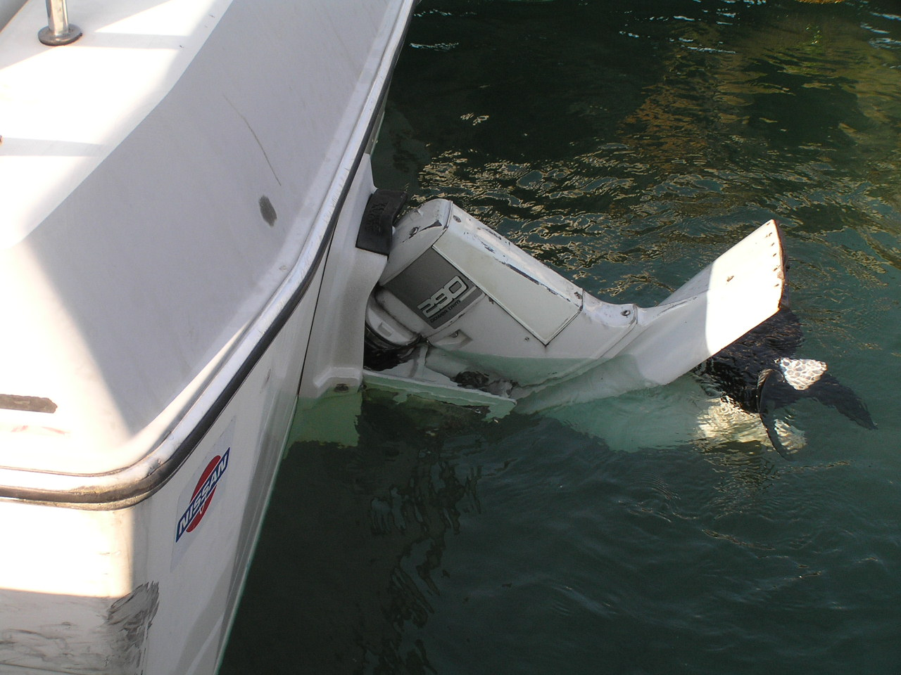 ドライブユニット ～photo by Autumn Snake 【おぉたむ すねィく探検隊】写真部門 担当 大原佳苗